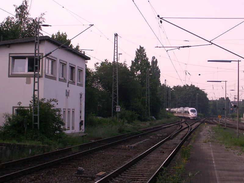 ice im Rheydter hbf